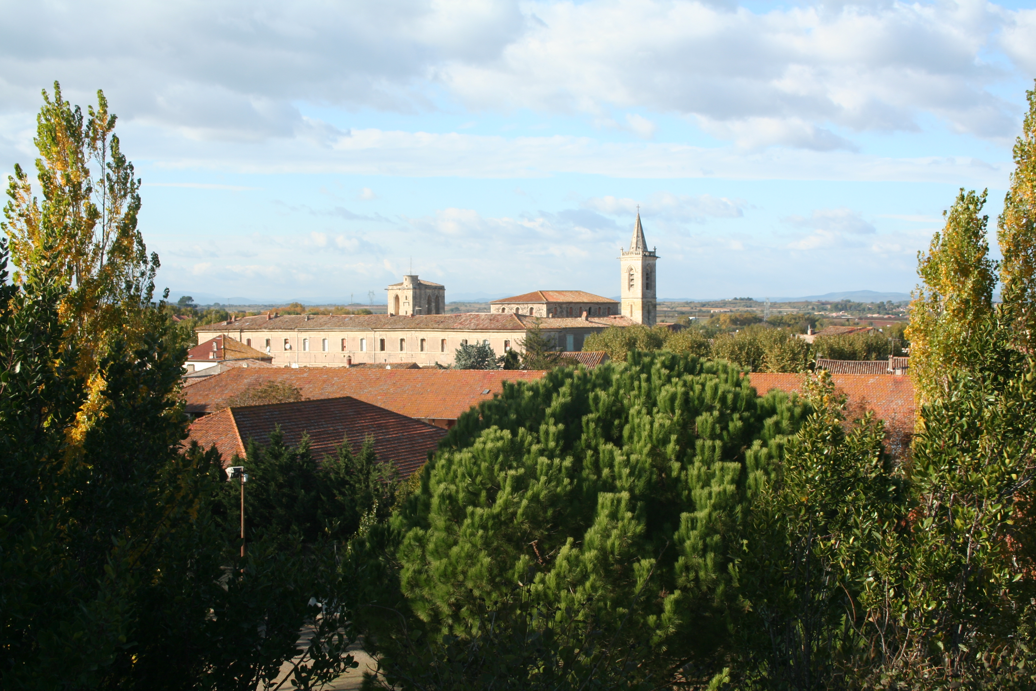 Saint-Thibéry (Hérault) - vue générale sur le village et vue sur les bâtiments de l'abbaye.